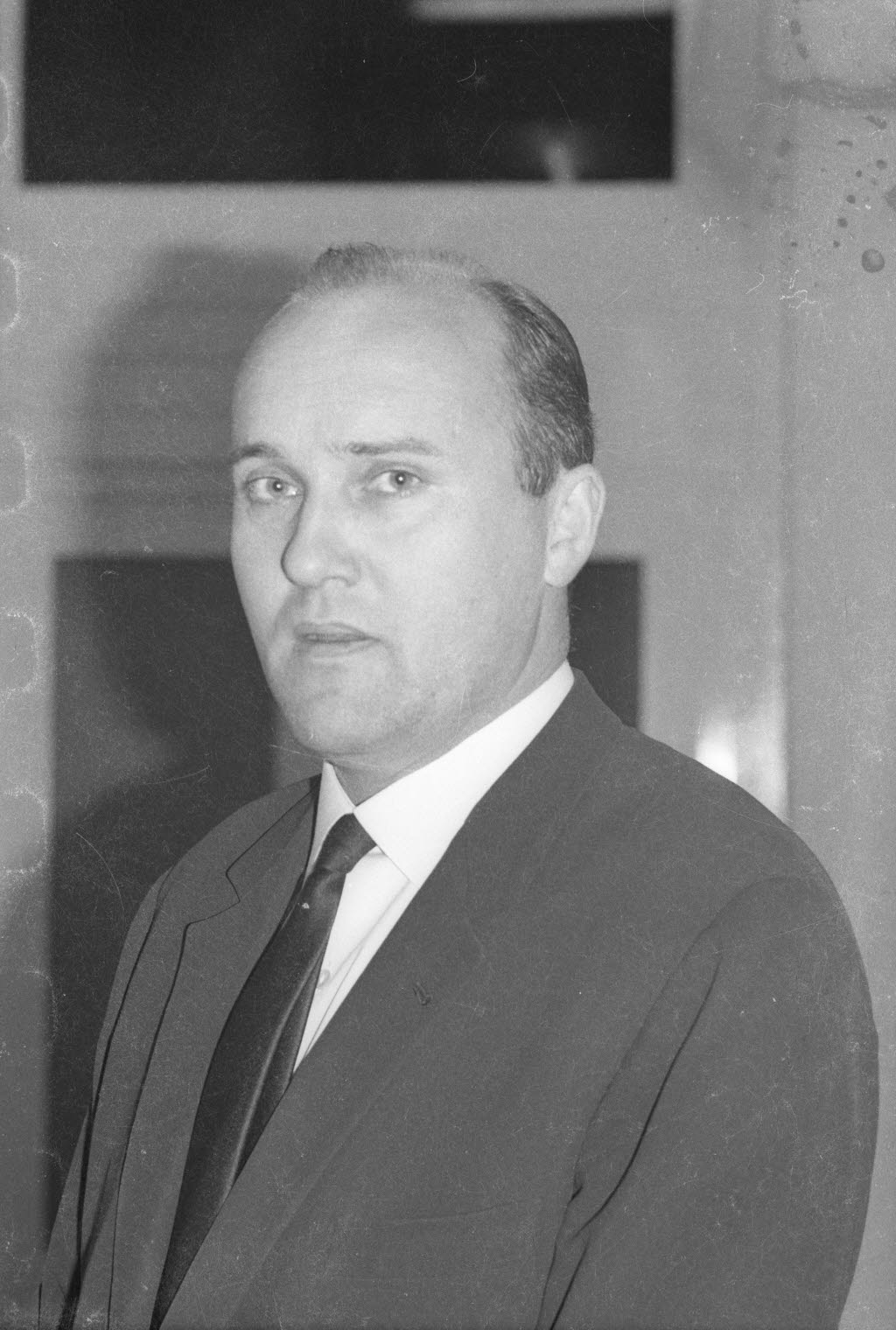 Direktor des Soziologischen Seminars der Christian-Albrechts-Universität (CAU). Referent der Kieler Universitätstage 1968.